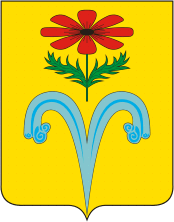 Герб Отрадненского района Краснодарского края